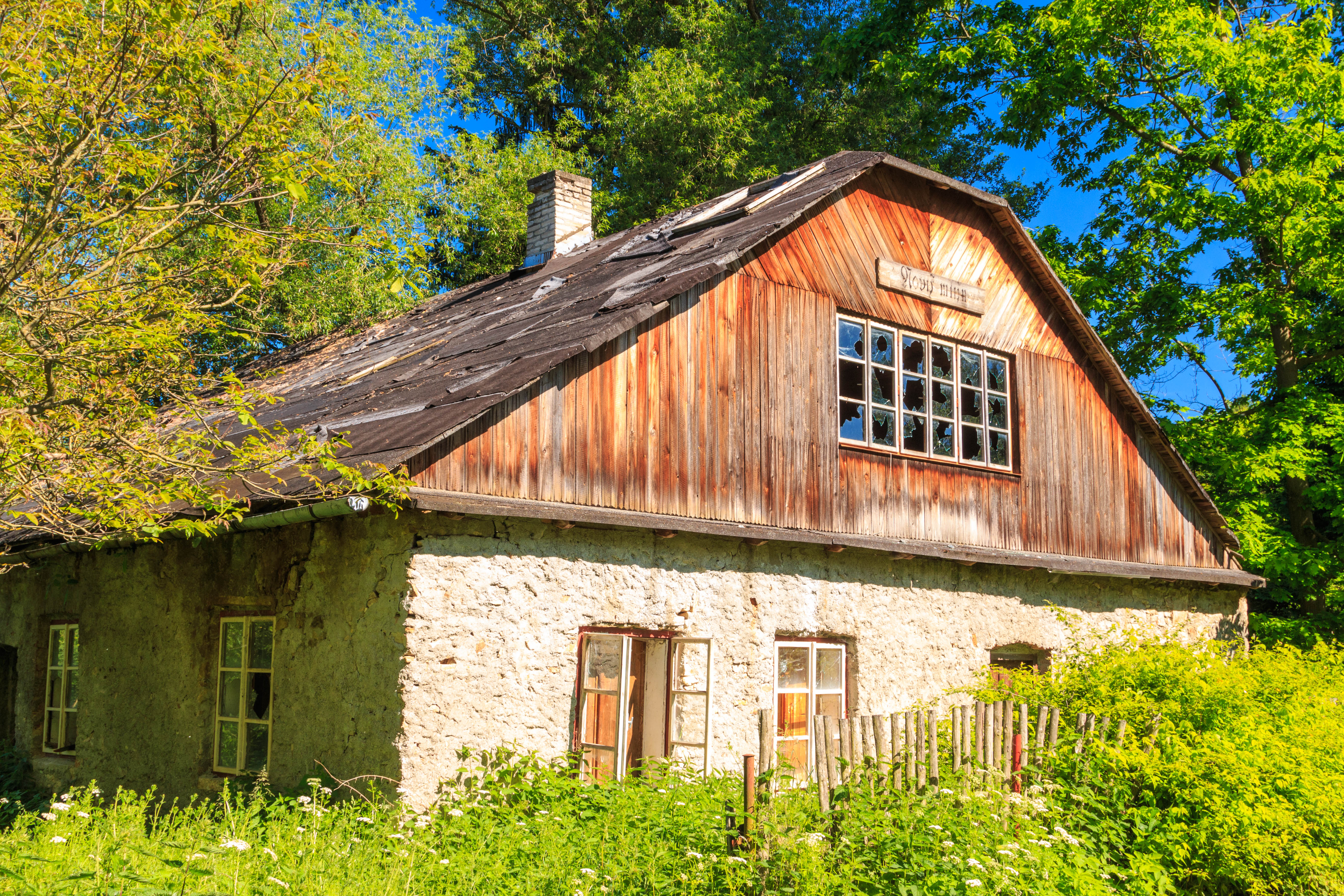 Nový mlýn u Podmoklan Project: Chráněná území.